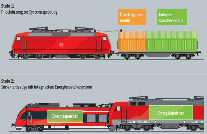 Mit Hilfe des Energie-Tenders, den das DLR und die Deutsche Bahn gemeinsam entwickeln, können Züge ohne Umspannen auch nicht elektrifizierte Streckenabschnitte nutzen.